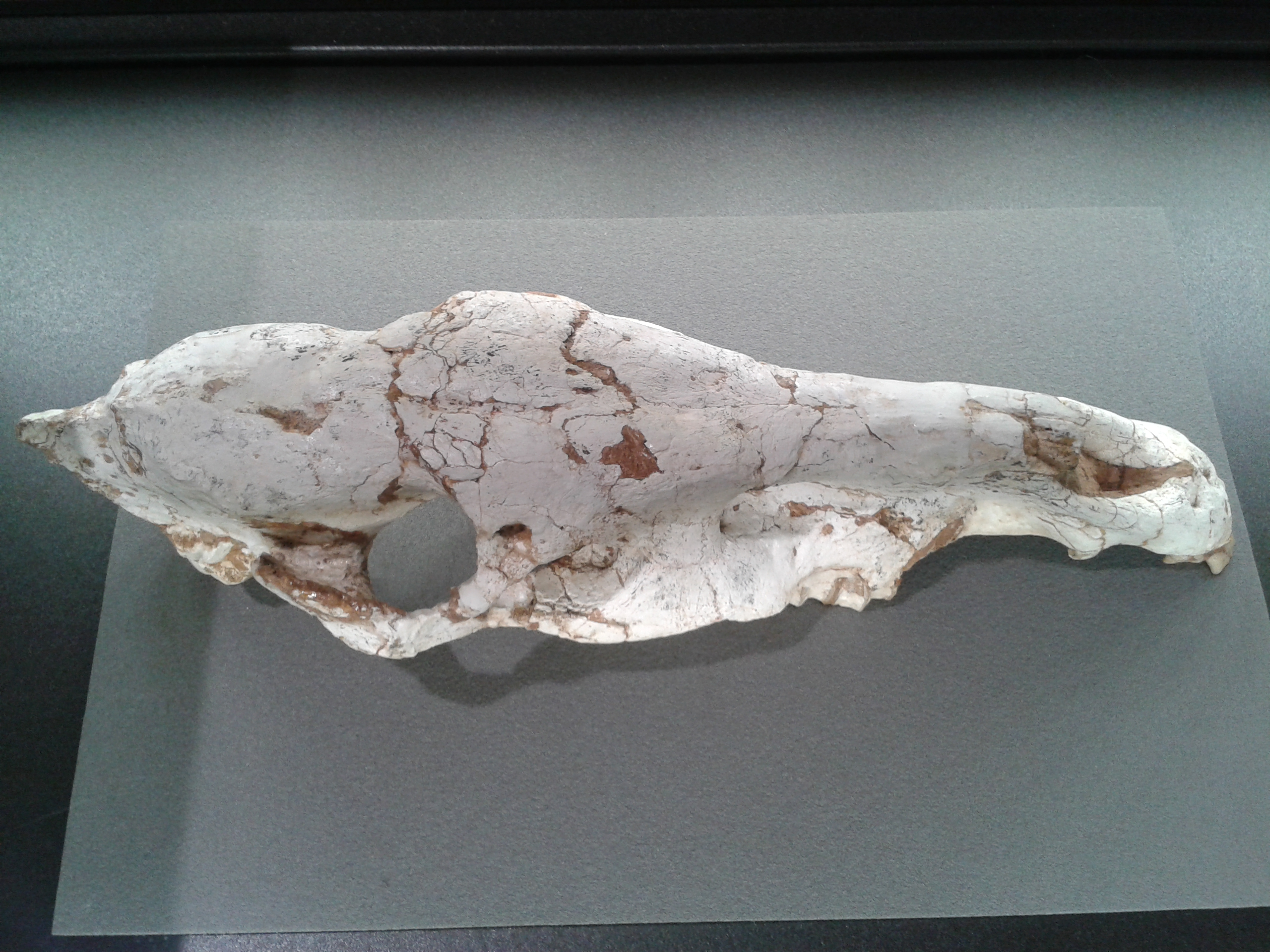 A cranial specimen of Hipparion catalaunicum.